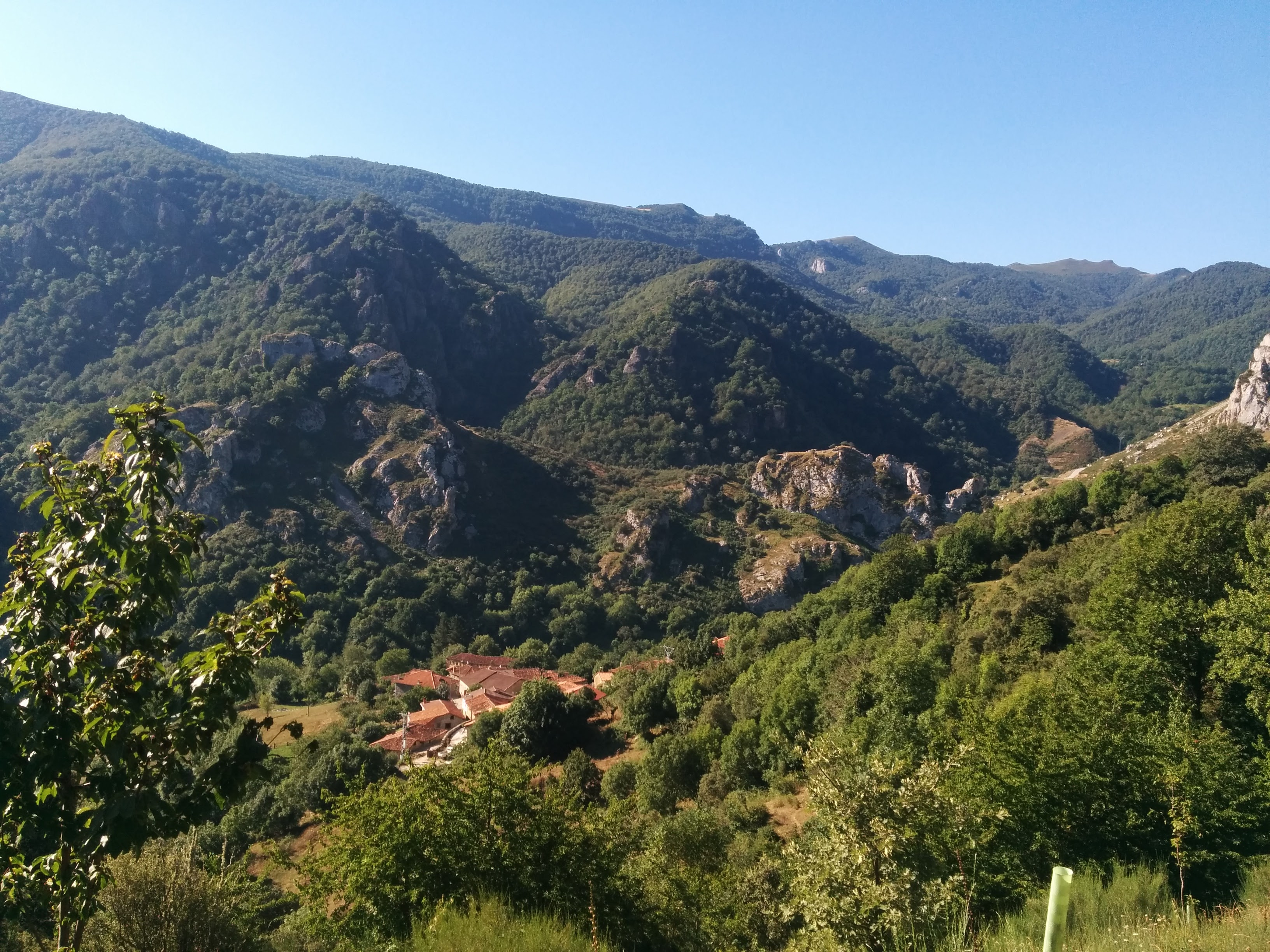 Vista de la localidad de Vendejo, en Cantabria.